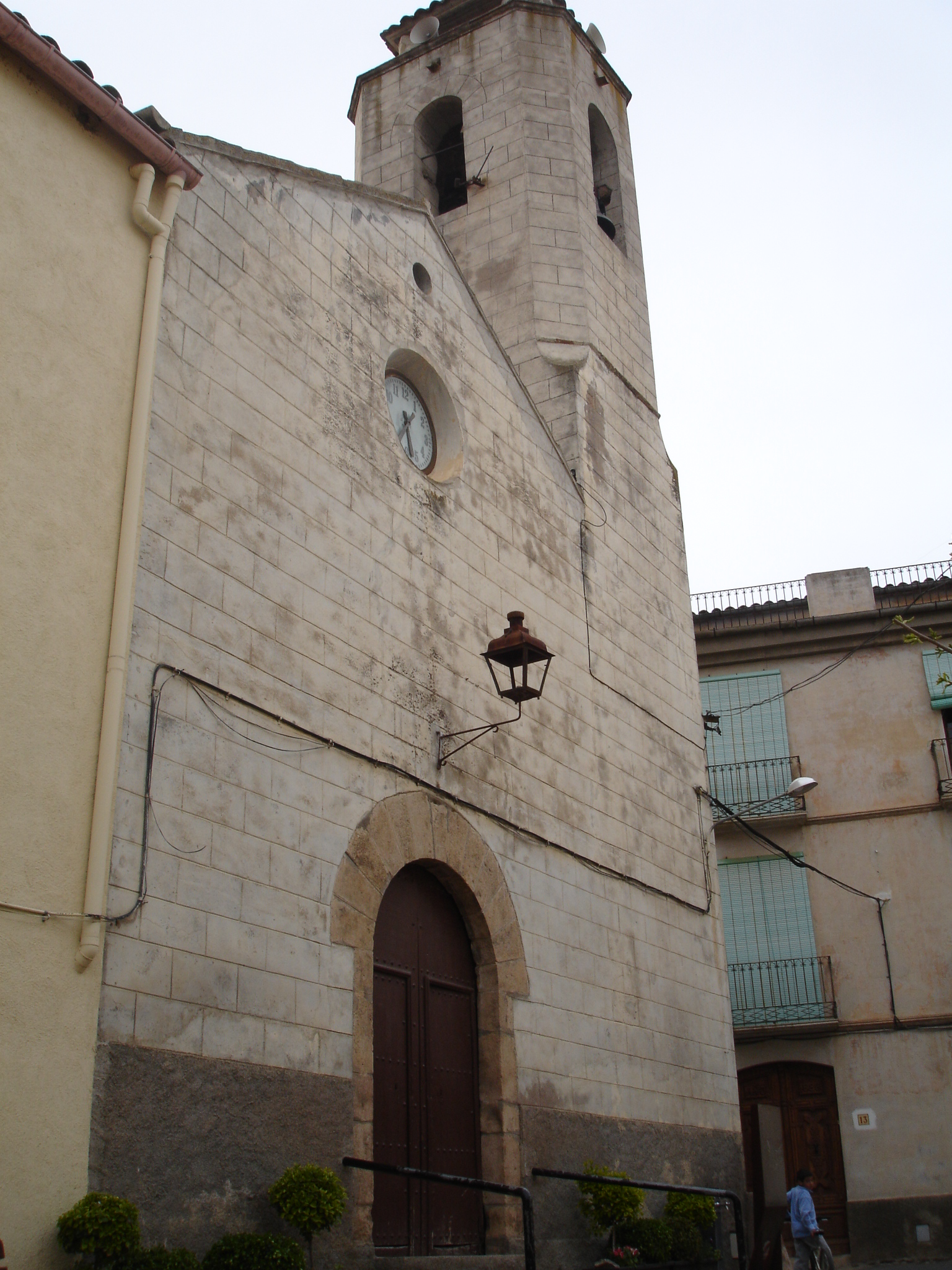 Església de Sant Domènec de la Serra d'Almos